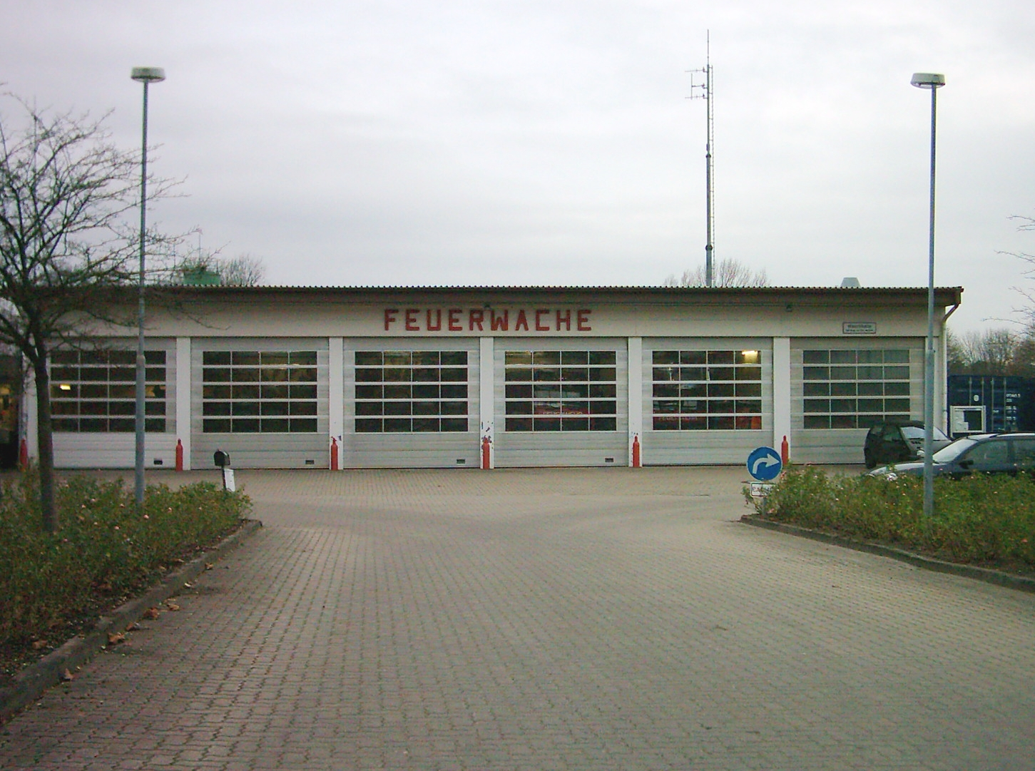 Feuerwache der Freiwilligen Feuerwehr Neu Wulmstorf.